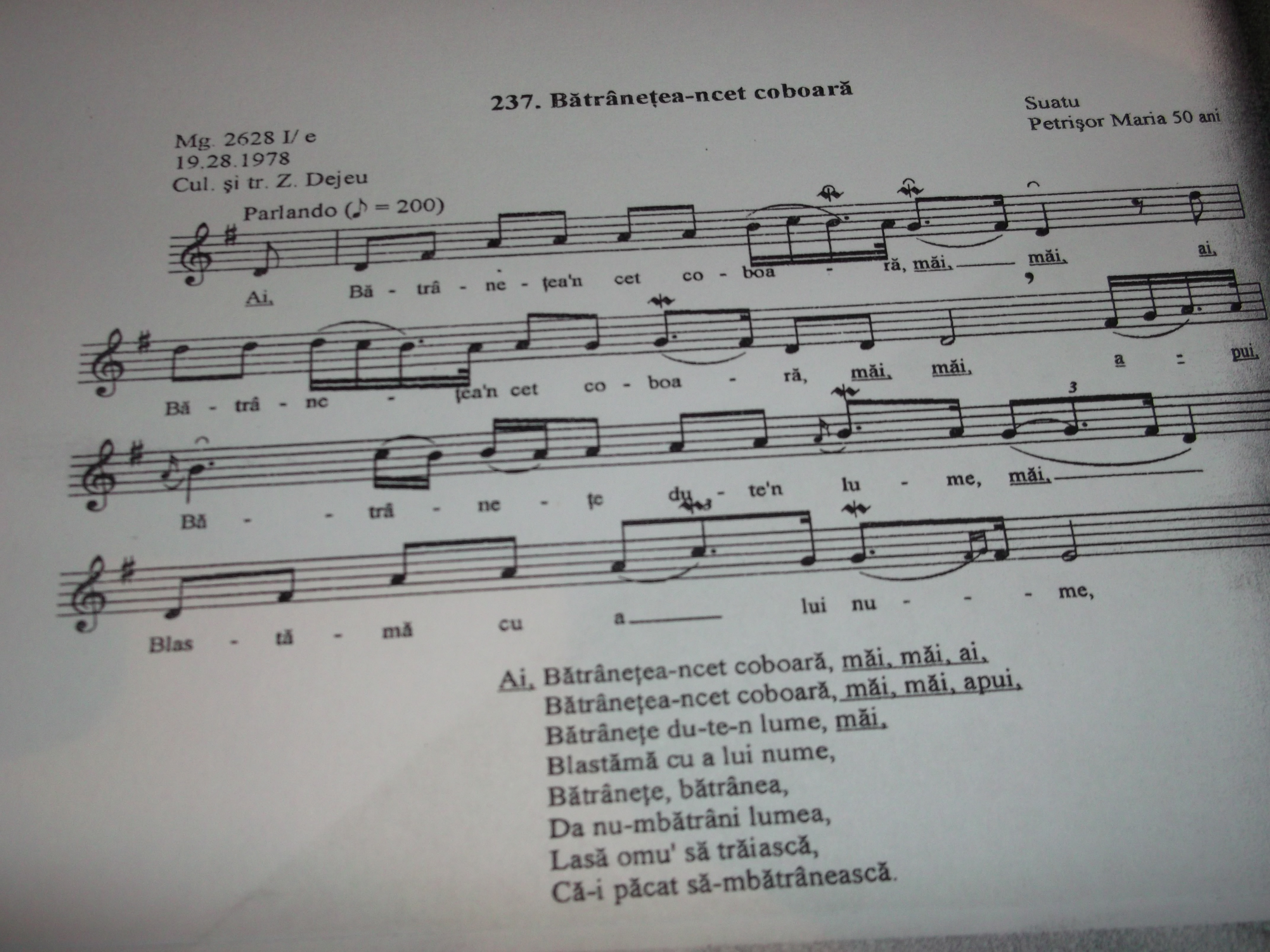 Cintec vechi din Aruncuta , cules in 1978 - de muzicologul Zamfir Dejeu - de la Petrisor Maria {" Mariuta lui Otel "} din comuna Suatu , sat.Aruncuta, jud.Cluj